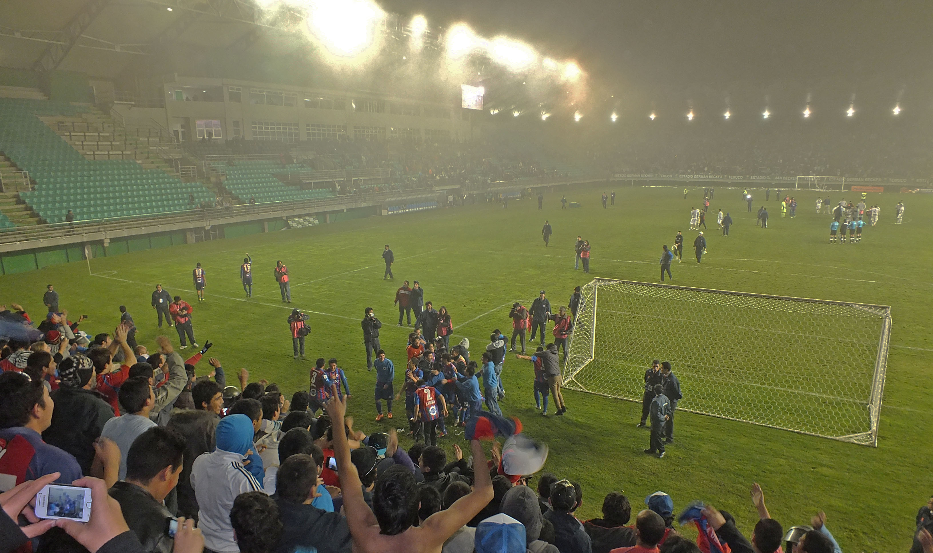 Estadio German Becker, Iberia vence por 3 goles a 0 a Deportes Temuco